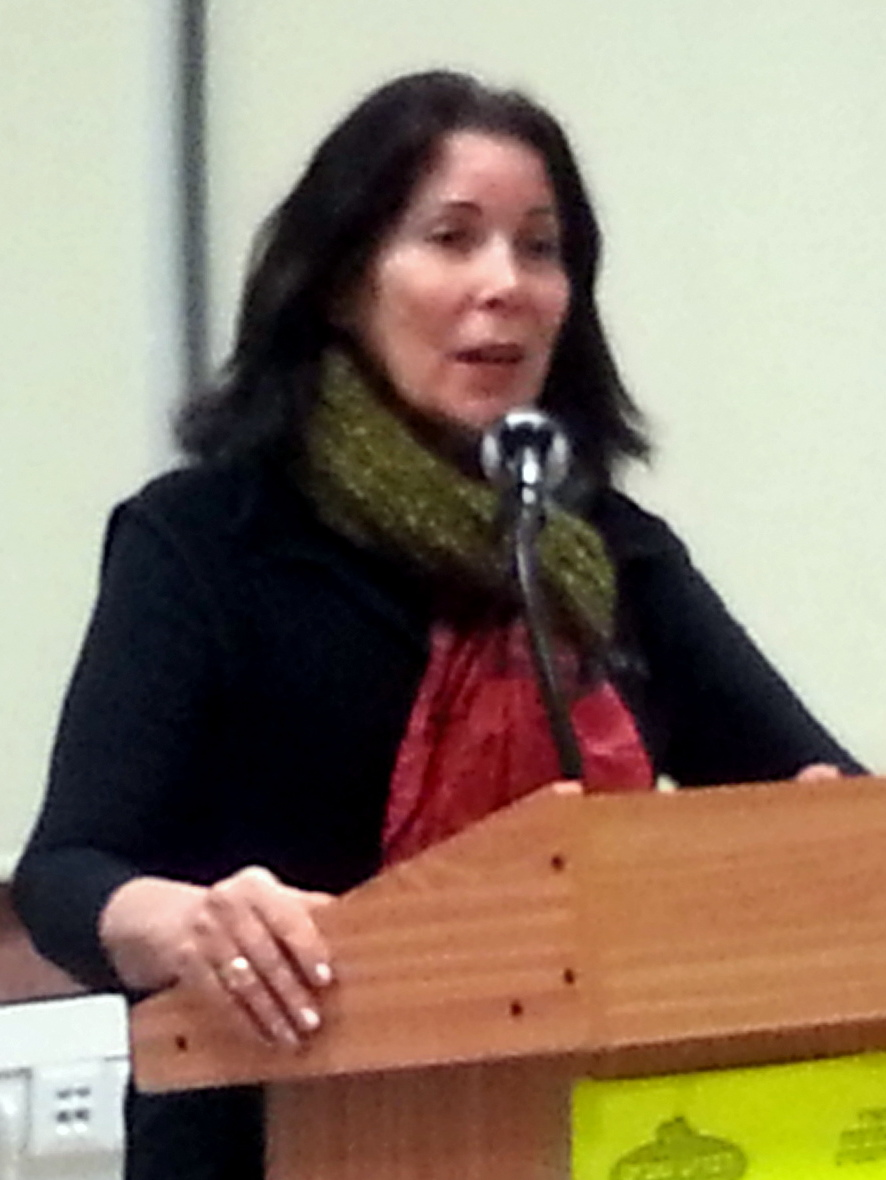 סביון ליברכט, במפגש סופרים בקרית ביאליק